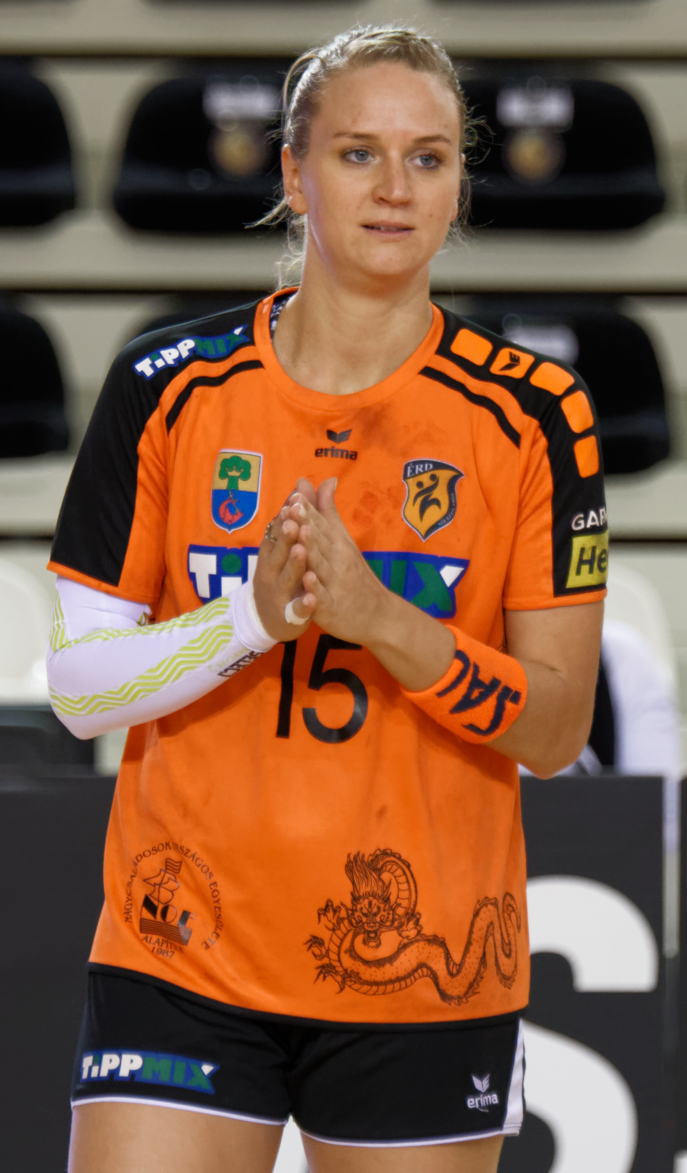 Rencontre retour du 3e tour de la coupe EHF, Issy Paris Hand / Erd. A Issy Les Moulineaux, le 18 novembre 2017.